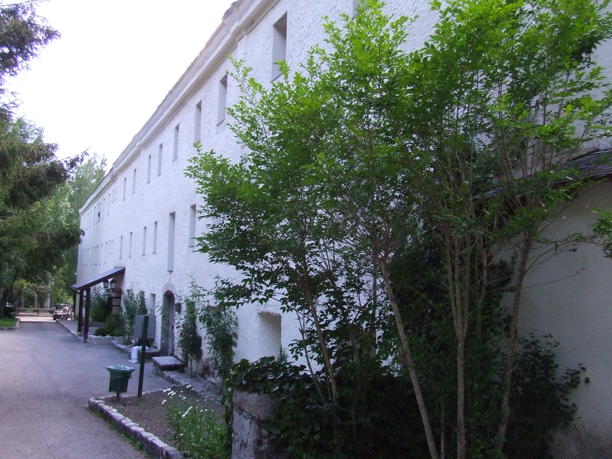 Balneari de Caldes de Boí (Vall de Boí, Alta Ribagorça)